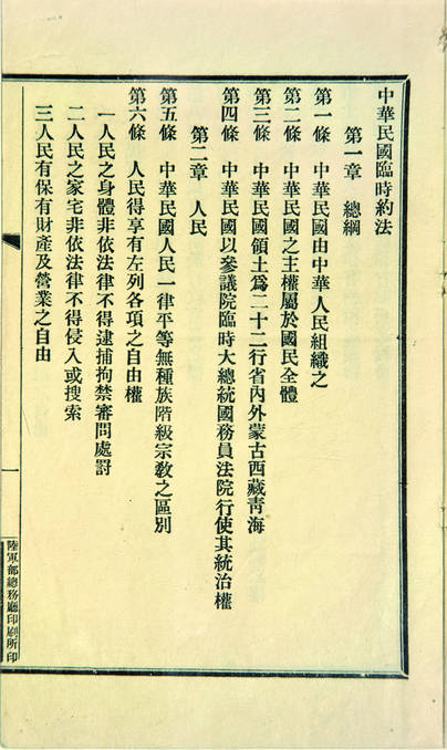 中华民国临时约法的图片